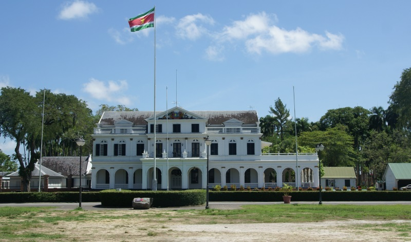 Presidentieel Paleis, Onafhankelijkheidsplein 1, Paramaribo, Suriname